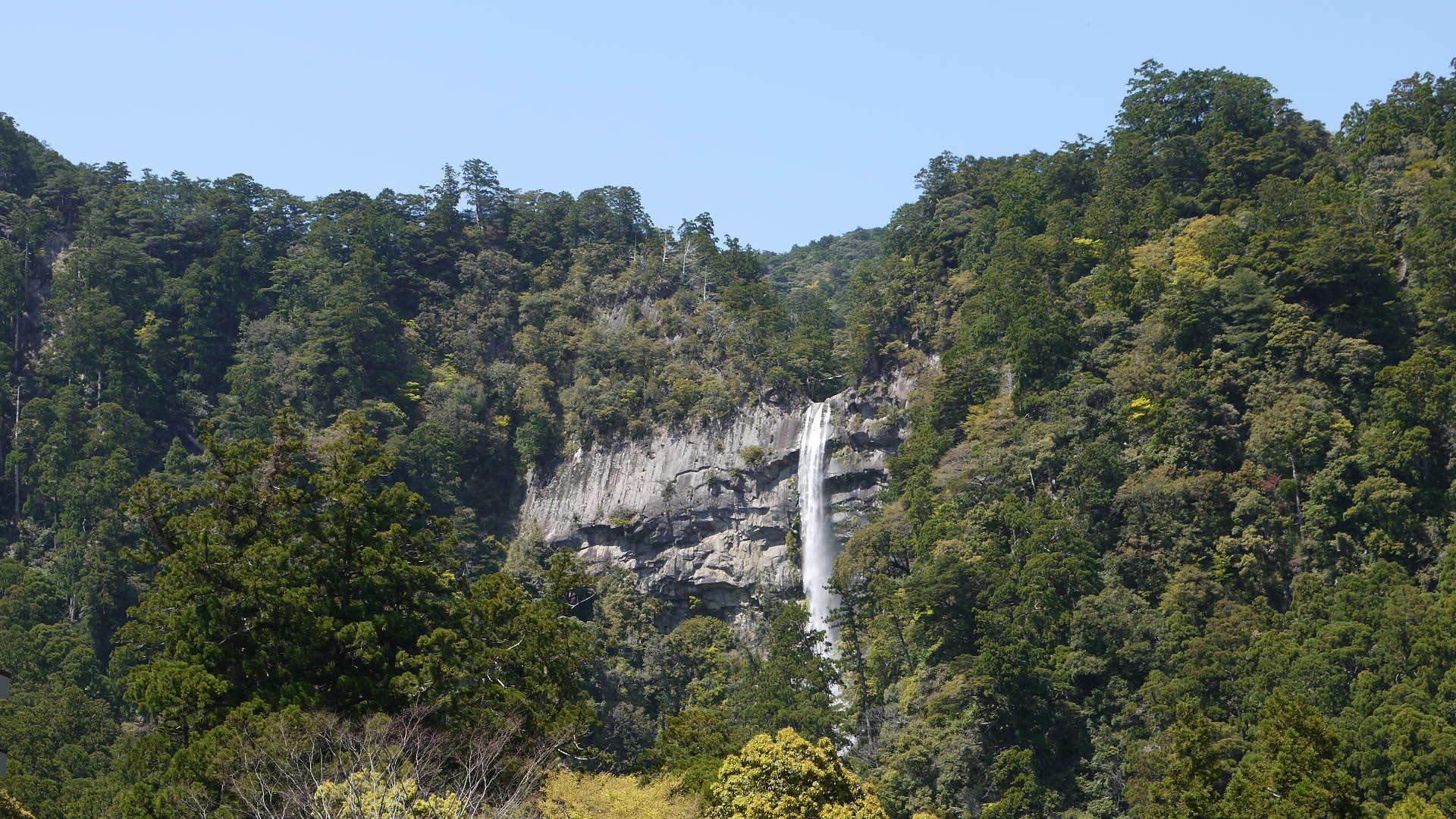 那智の滝2